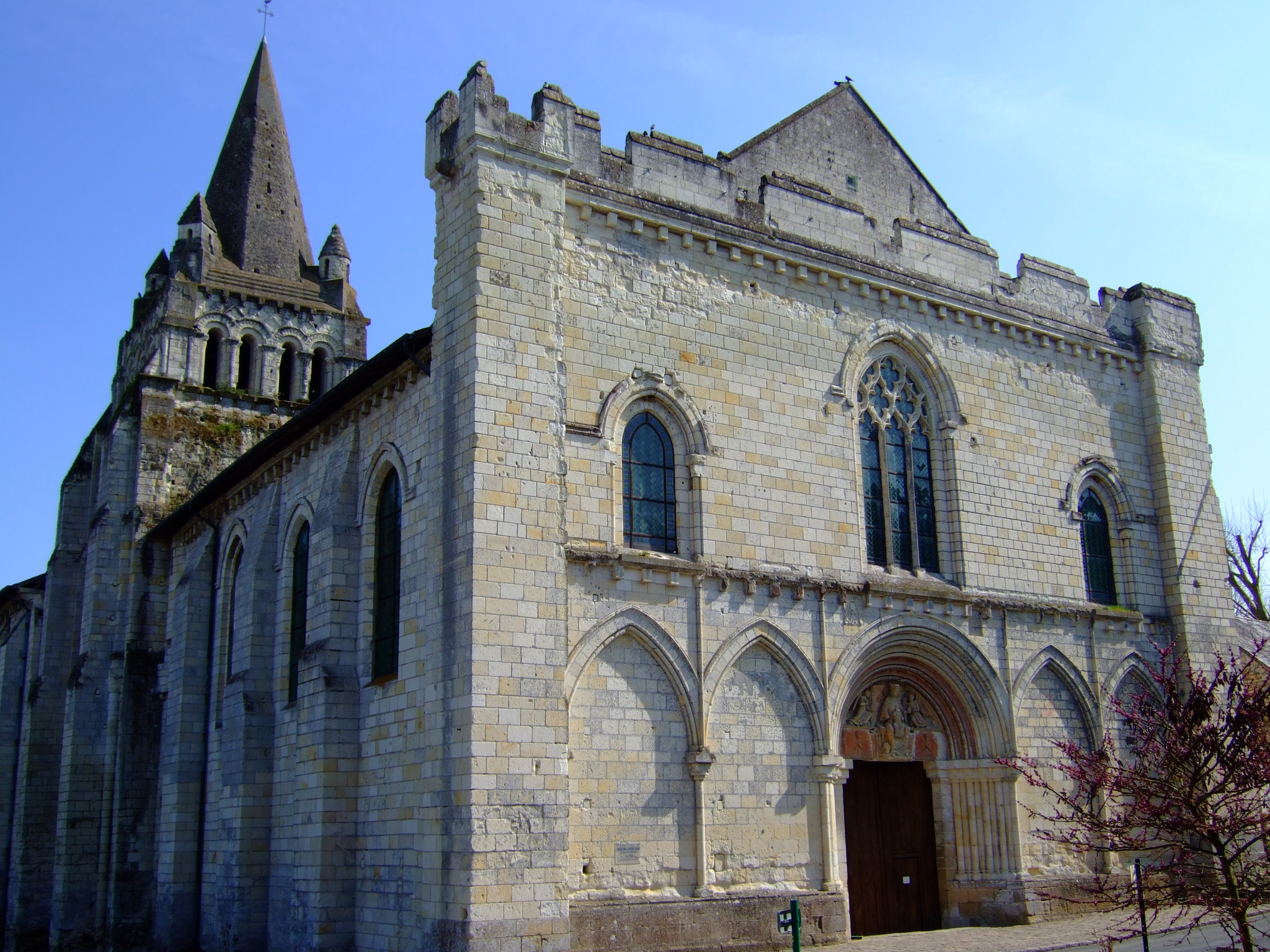 L'église Notre-Dame à Cunault